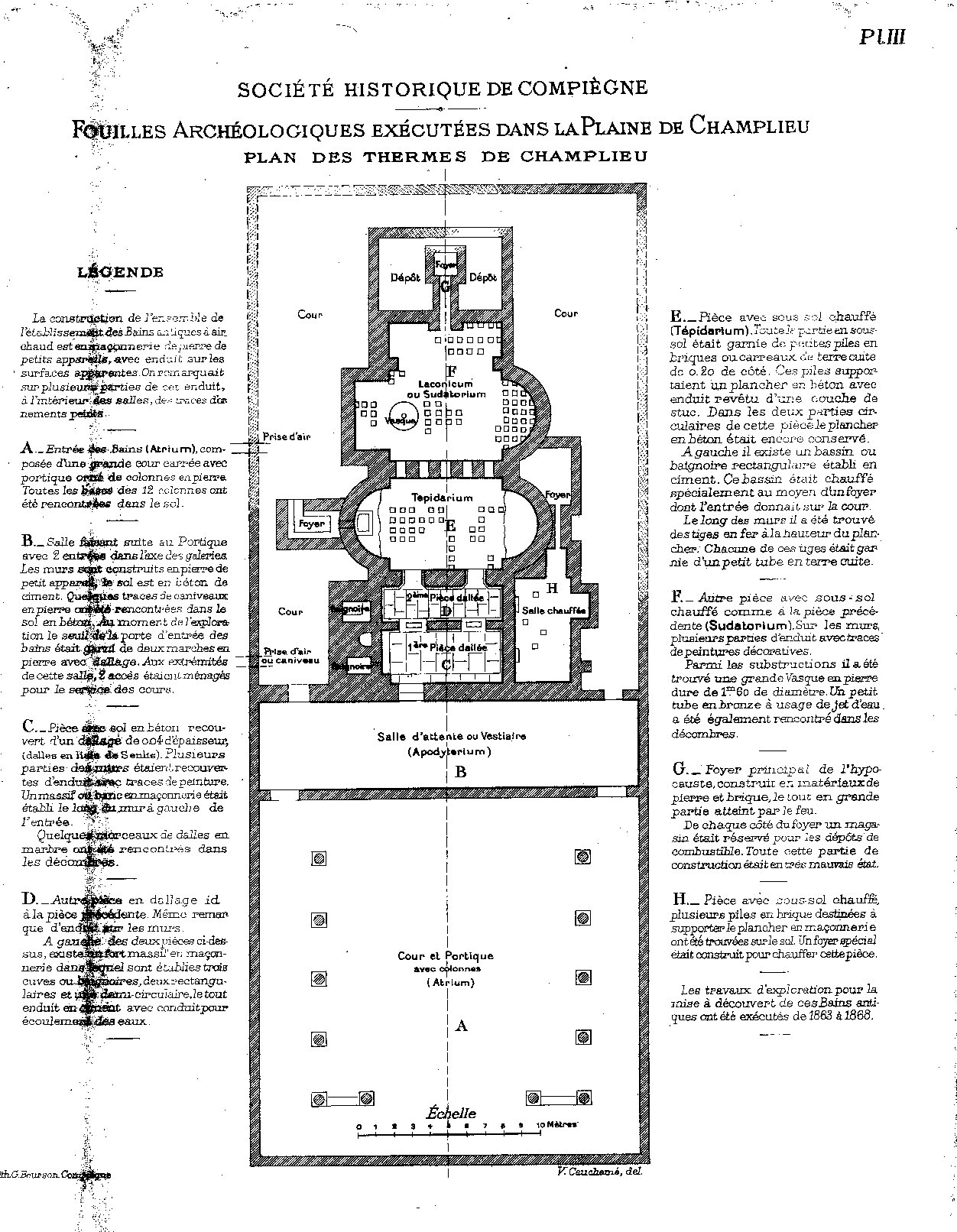 Plan des thermes de Champlieu, 1912, d'après les relevés des fouilles de 1862/68 dirigées par Albert de Roucy.